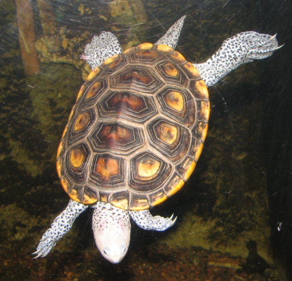 Malaclemys terrapin